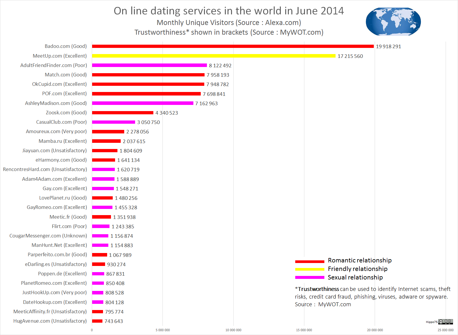 On line dating services in the world in June 2014 Monthly Unique Visitors (Source : ) Trustworthiness* shown in brackets (Source : )